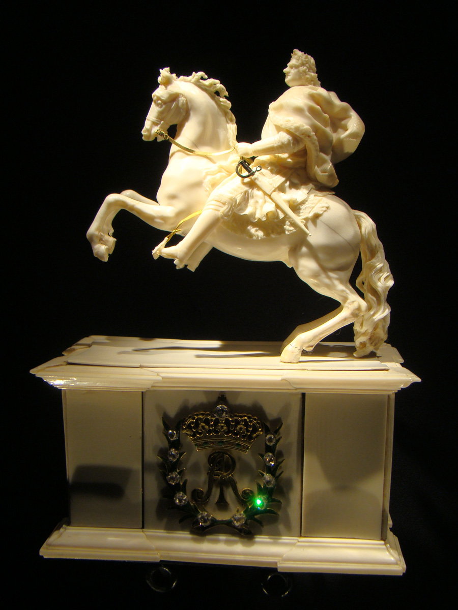 Hist. Exponat, Schlossmuseum Gotha, Schloss Friedenstein Reiterstatuette Augusts des Starken, wohl von Wilhelm Krüger, Dresden, um 1715/20